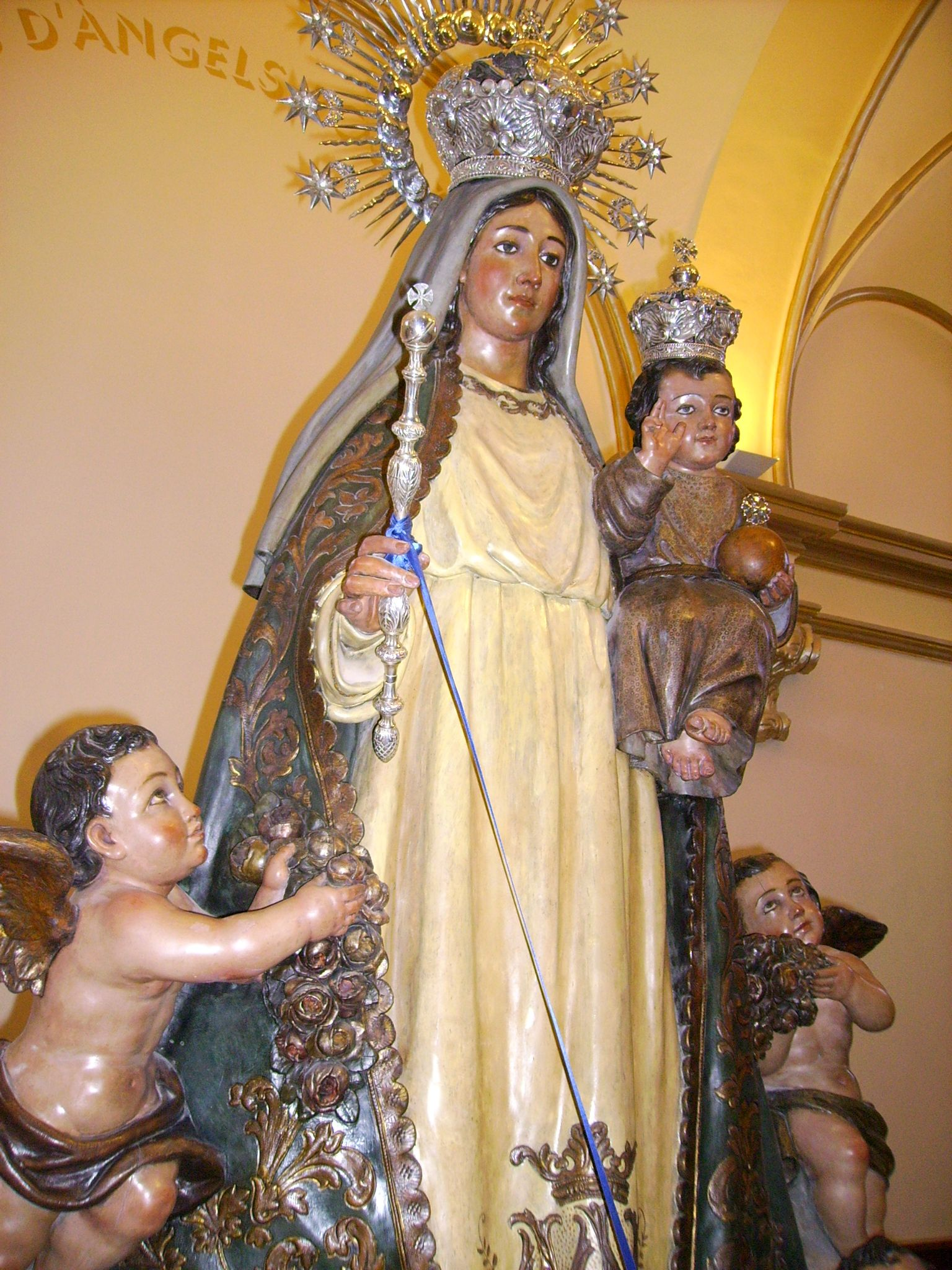 Santuari de la Mare de Déu dels Àngels (Sant Martí Vell)